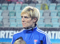 a_4_0993